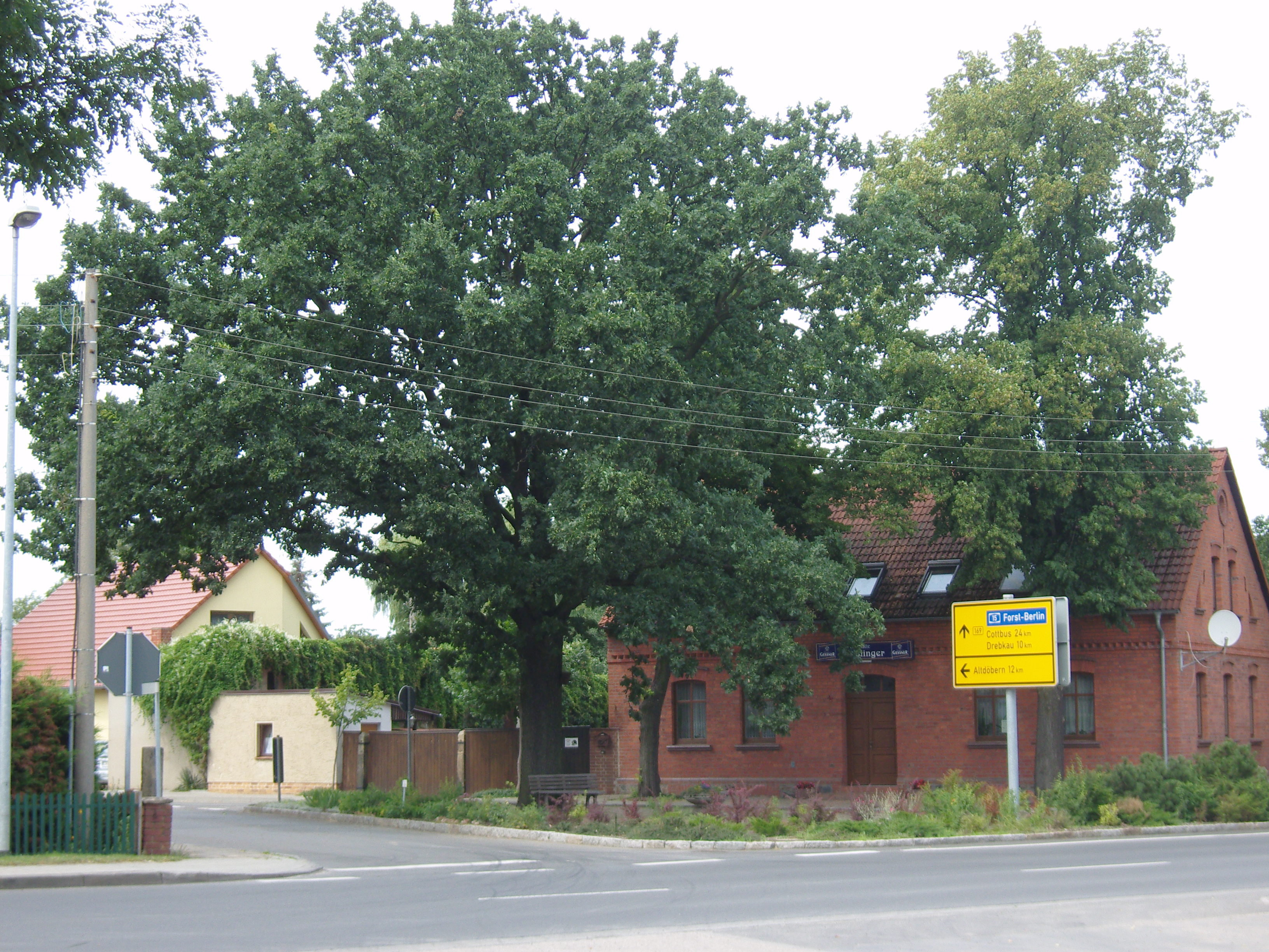 Bundesstraße 169 in Lindchen einem Gemeindeteil der Gemeinde Neu-Seeland im Landkreis Oberspreewald-Lausitz